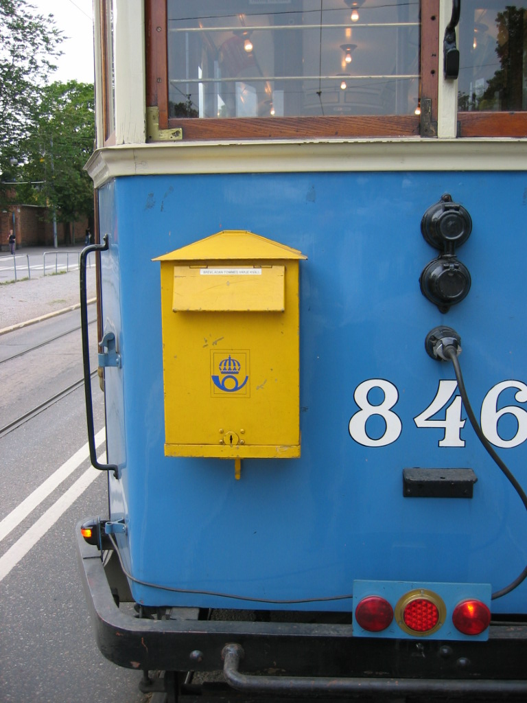 Mailbox on a tram at Djurgårdslinjen in Stockholm.